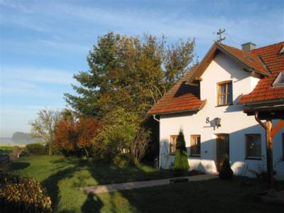 Das Vipassana-Zentrum "Buddhayana" (Fahrzeug des Buddha) in der Nähe von Ingolstadt, geleitet von Ludwig Schafft. Das gut ausgestattete Haus steht auf Spendenbasis Lehrenden für ihre Kurse, aber auch privaten Gruppen und Einzelnen für individuelle Meditationsretreats zur Verfügung.